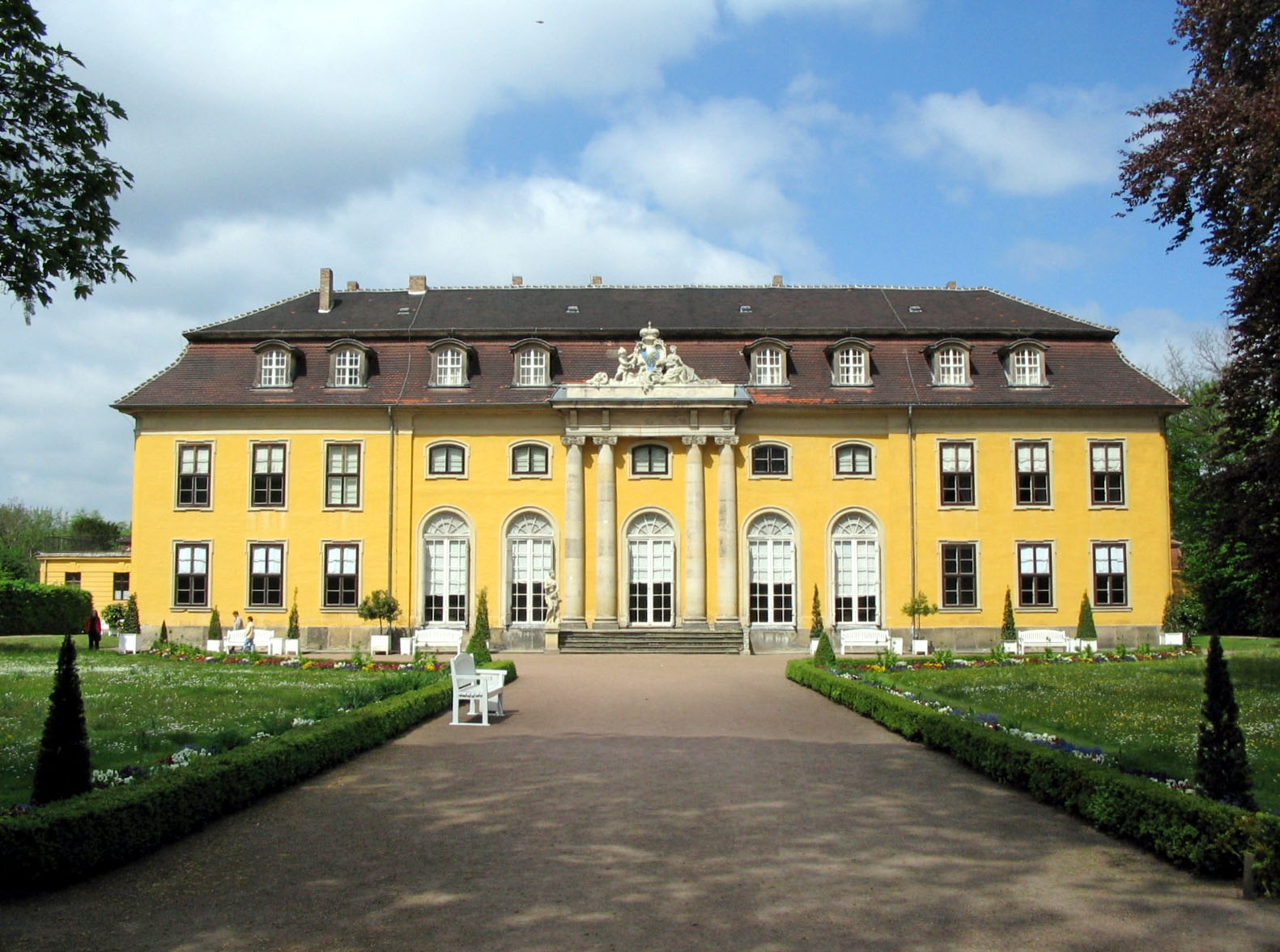 Schloss Mosigkau Gartenseite